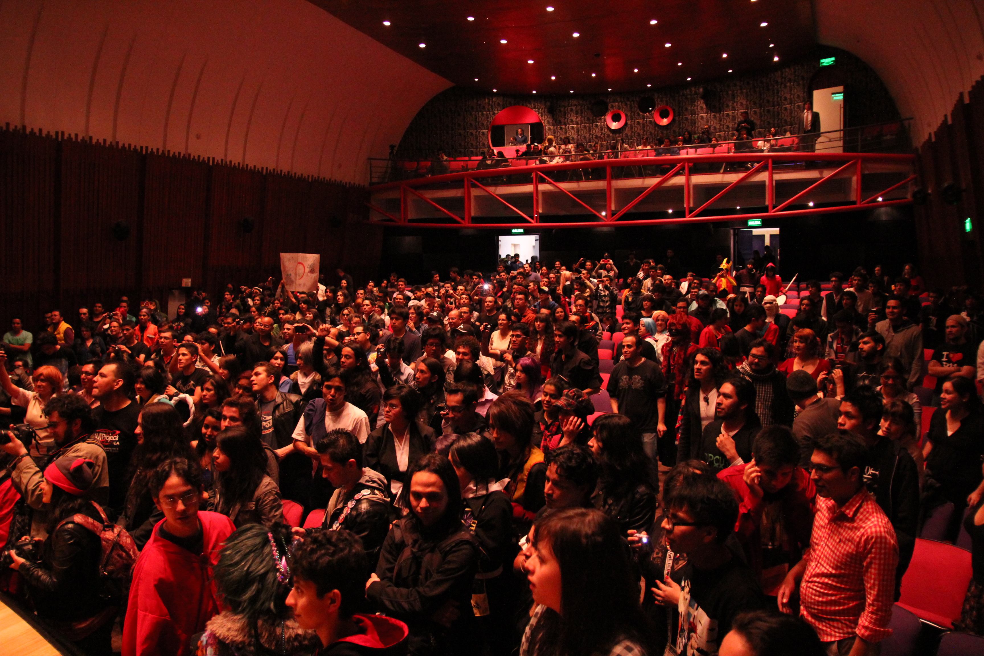 Tokyo Impact! Festival foto 2